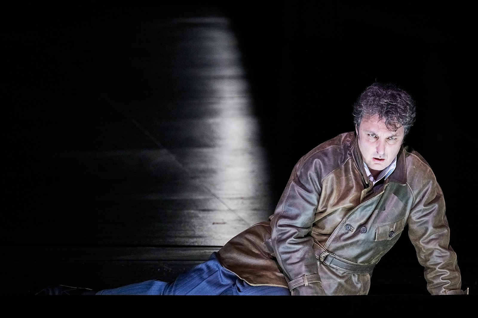 Simon Boccanegra, Agathe Popeney, Paris-Bastille 2018